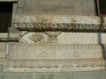 建筑上的须弥座装饰，2005年3月5日摄于原辅仁大学大楼。